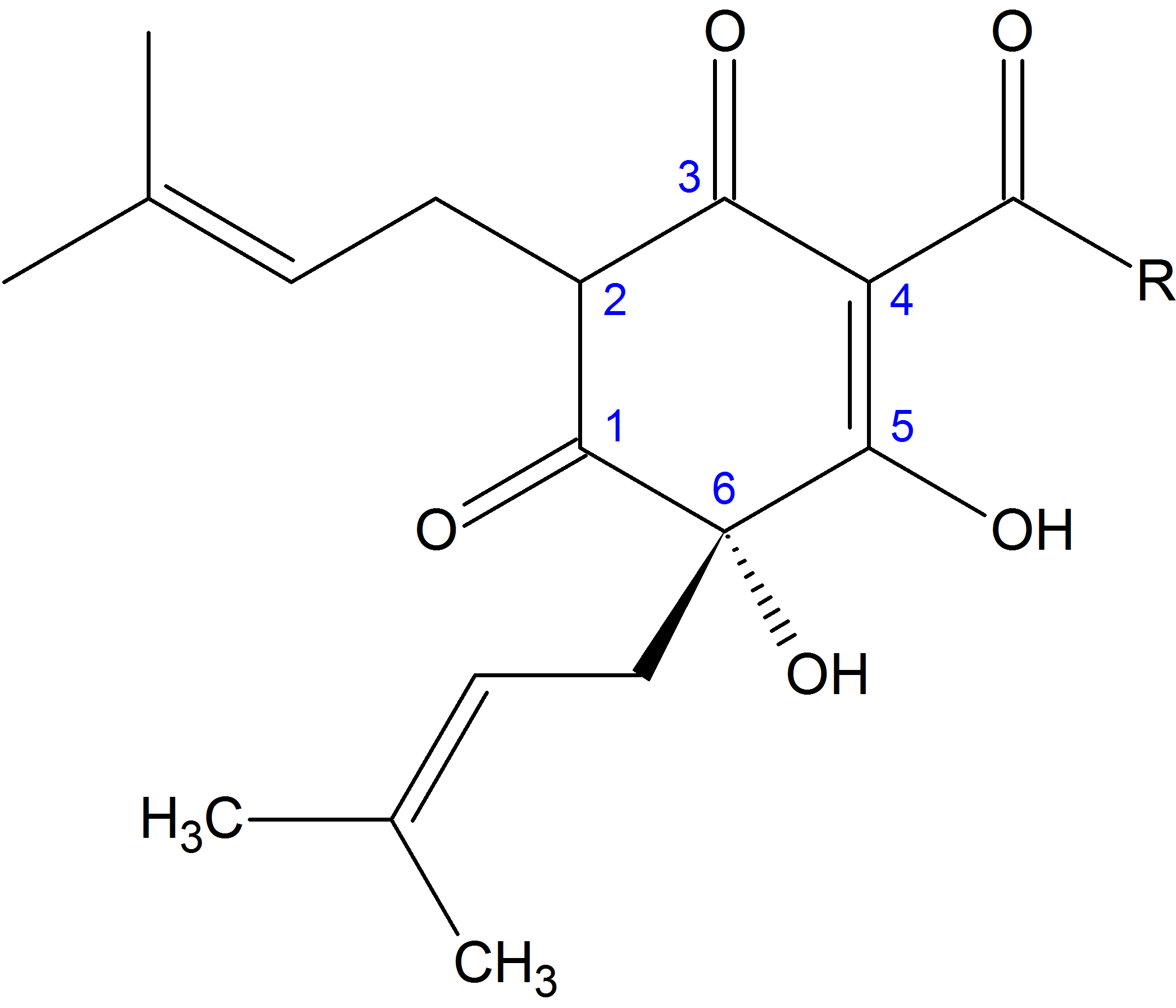 Allgemeine Strukturformel der Humulone